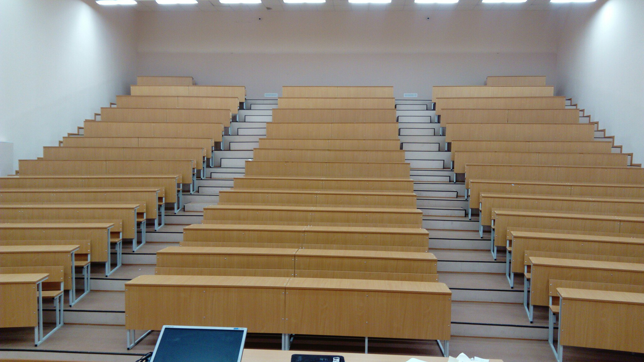 Лекторий в СПбГТУРП (А-342).